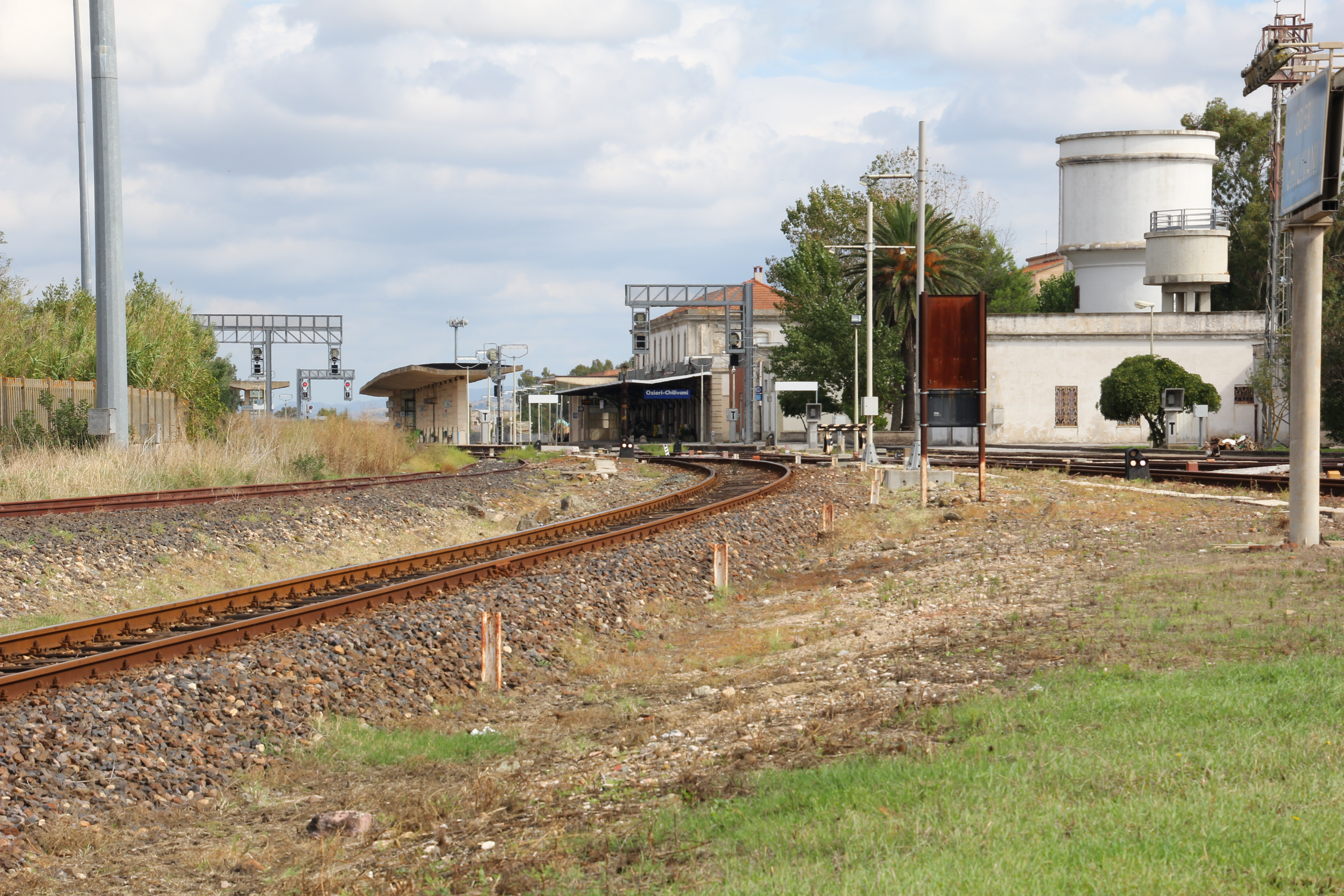 Ozieri - Stazione ferroviaria di Chilivani